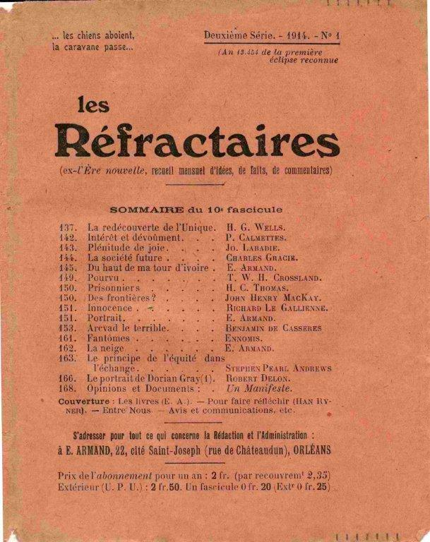 Couverture de "Les Réfractaires" (revue anarchiste individualiste) -n° 1-1914